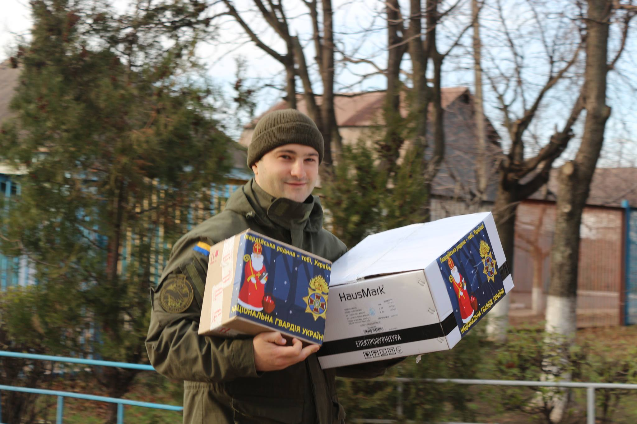 Діяльність CIMIC NGU з доставки гуманітарної допомоги